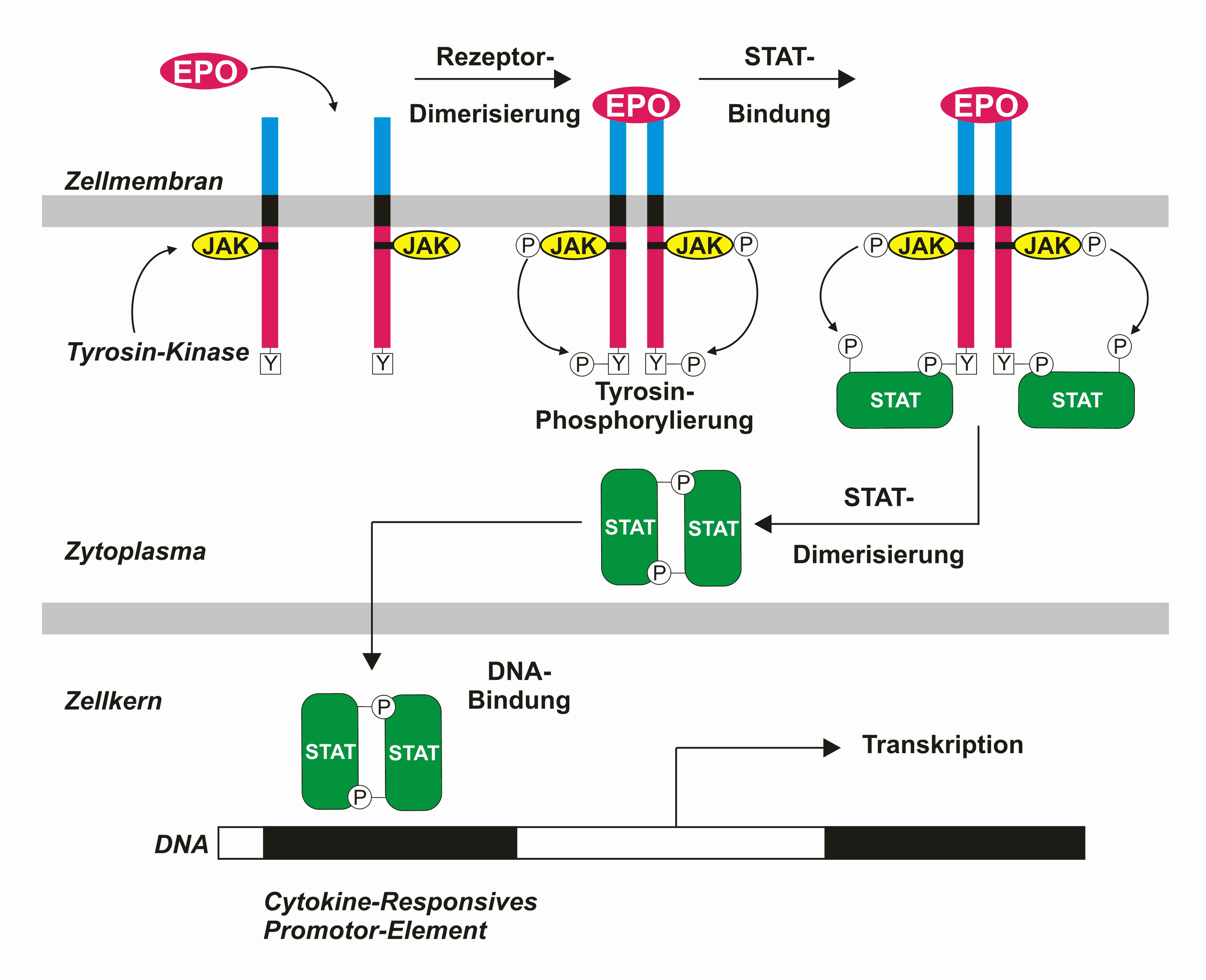 vereinfachte Darstellung der Signaltransduktion nach Bindung von EPO an seinen Rezeptor